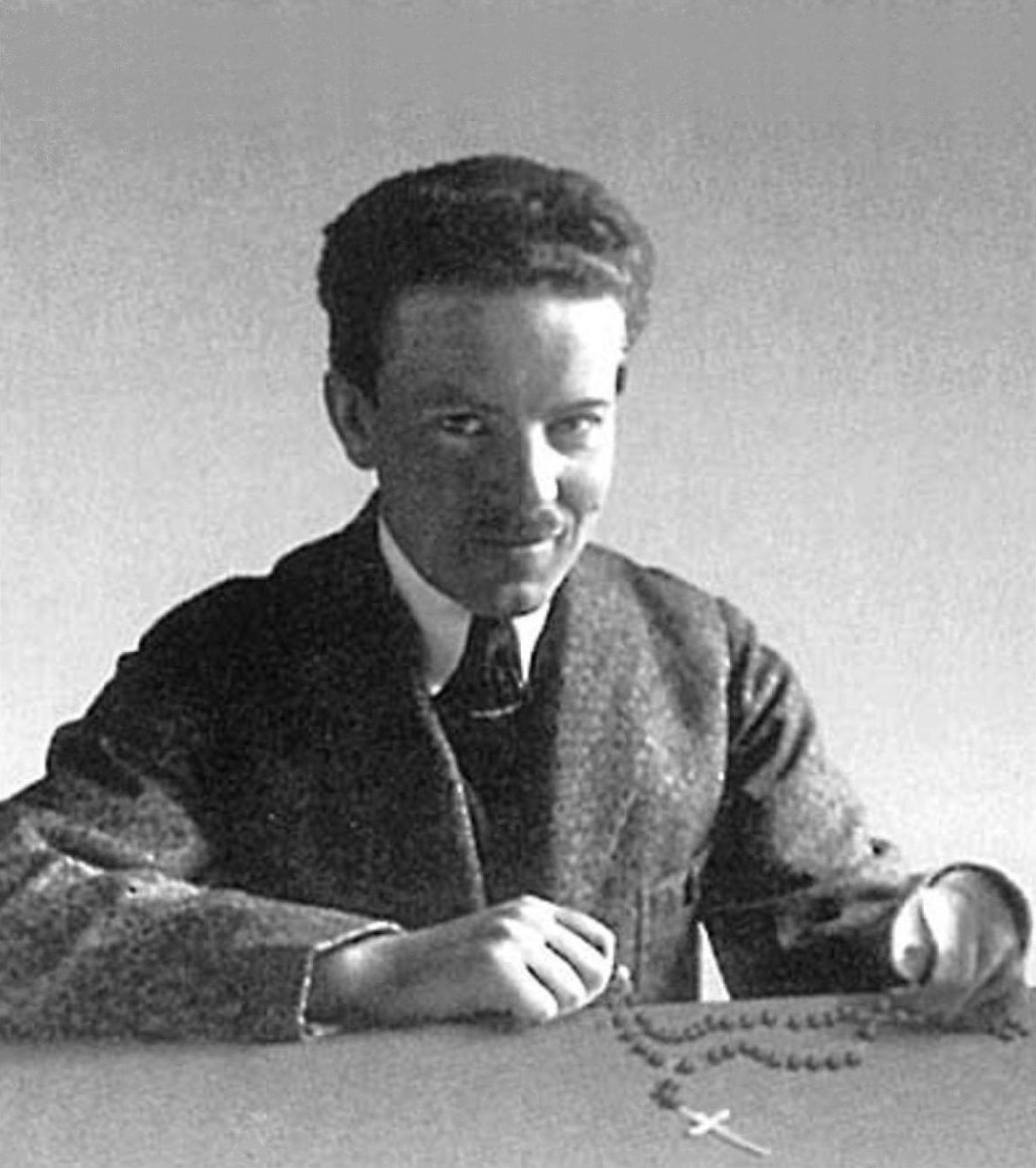 Zdjęcie Jana Leopolda Tyranowskiego (ok. 1940)